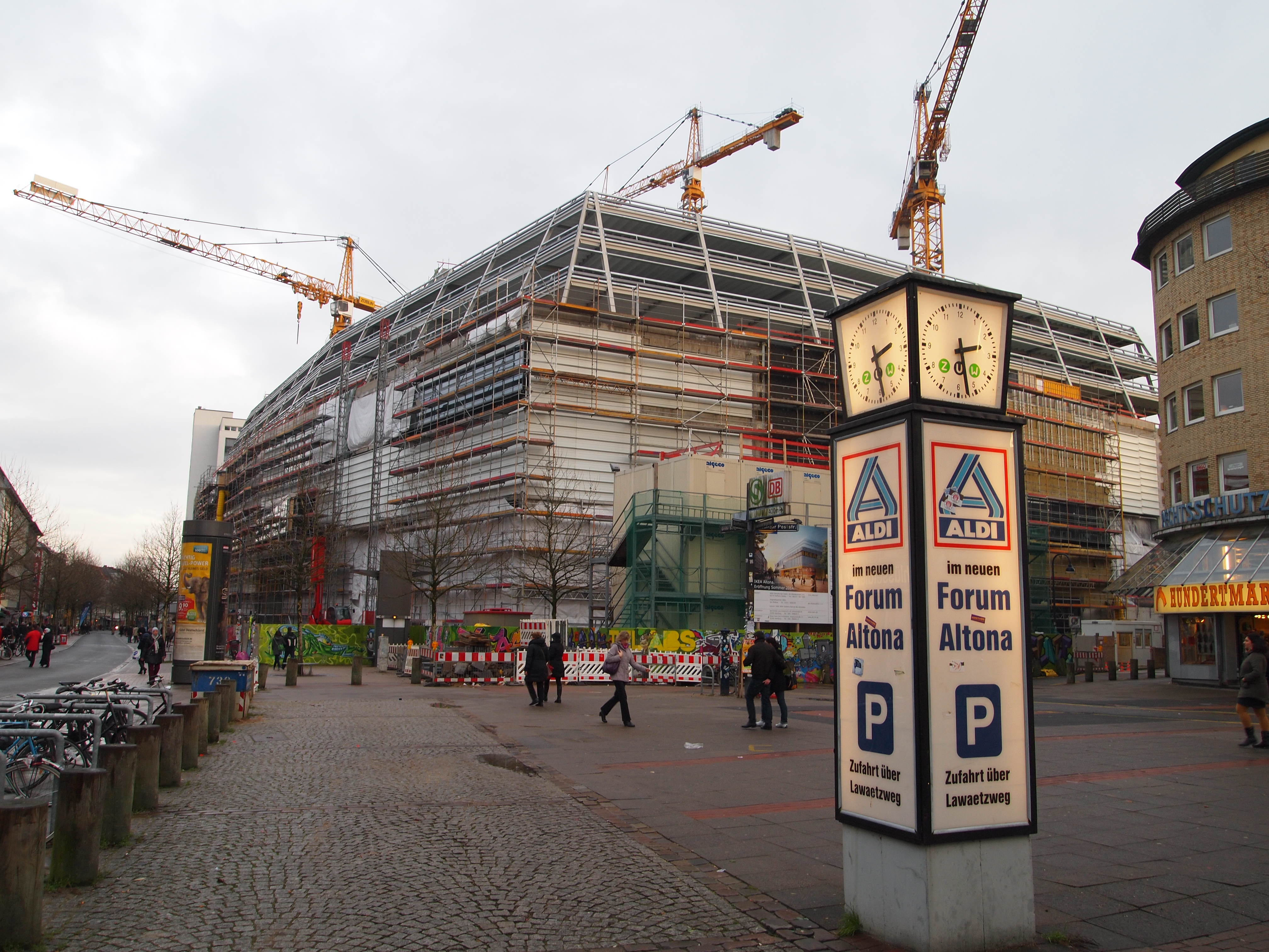 baustelle ikea altona, blick aus richtung goetheplatz hamburg altona